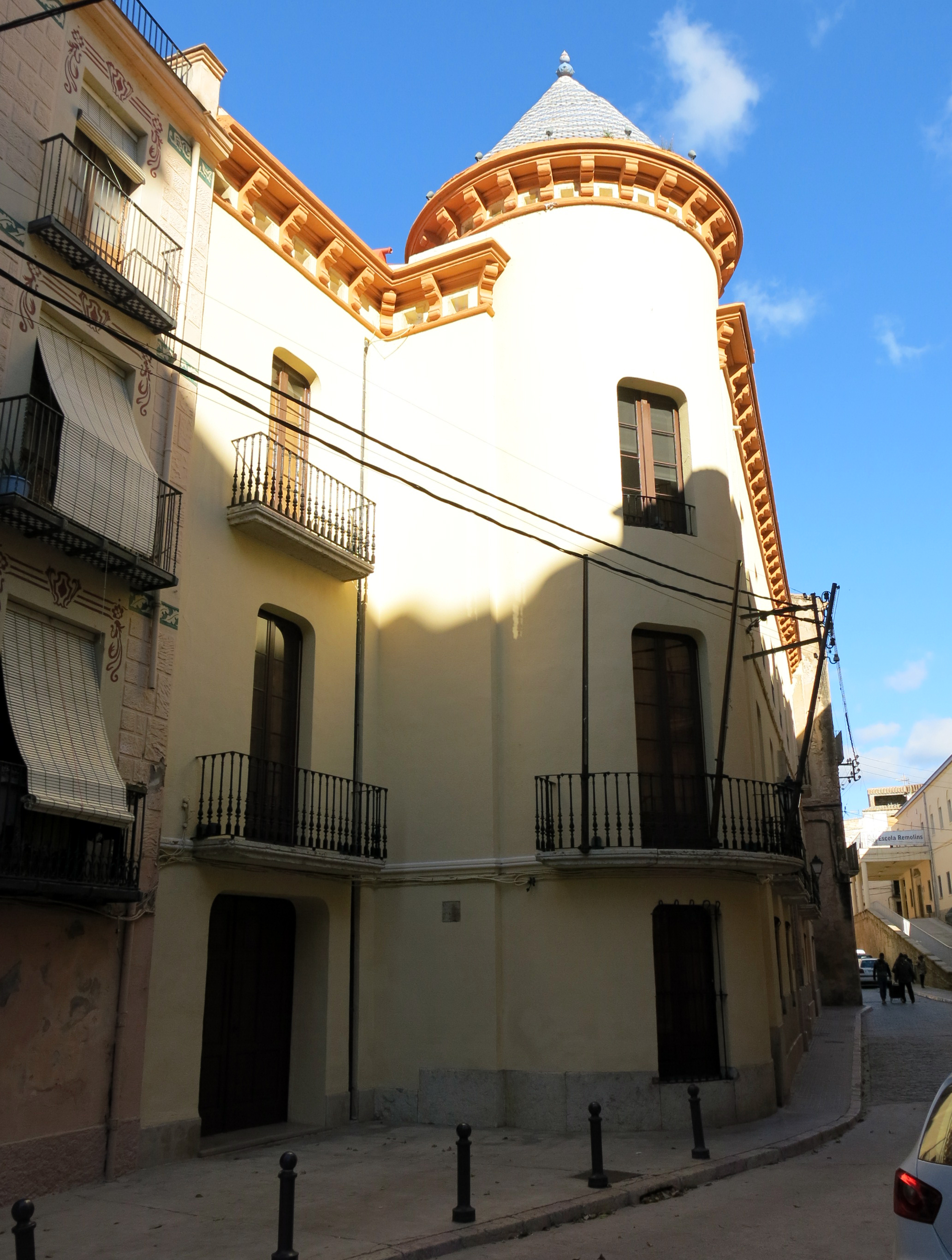 Comunitat de Regants Esquerra de l'Ebre (Tortosa)